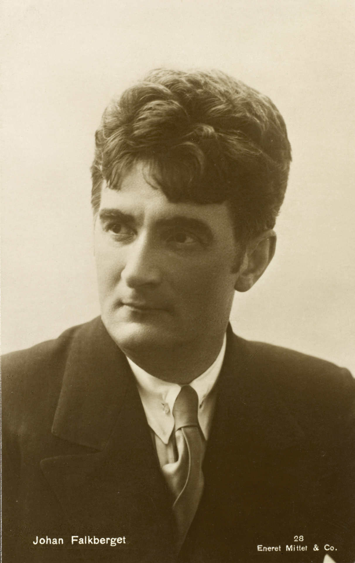 Tittel / Title: Portrett av Johan Falkberget (1879-1967) Motiv / Motif: Postkort. Dato / Date: ukjent / unknown Utgiver / Publisher: Mittet & Co. (nr 28) Bildesignatur / Image Number: blds_01052